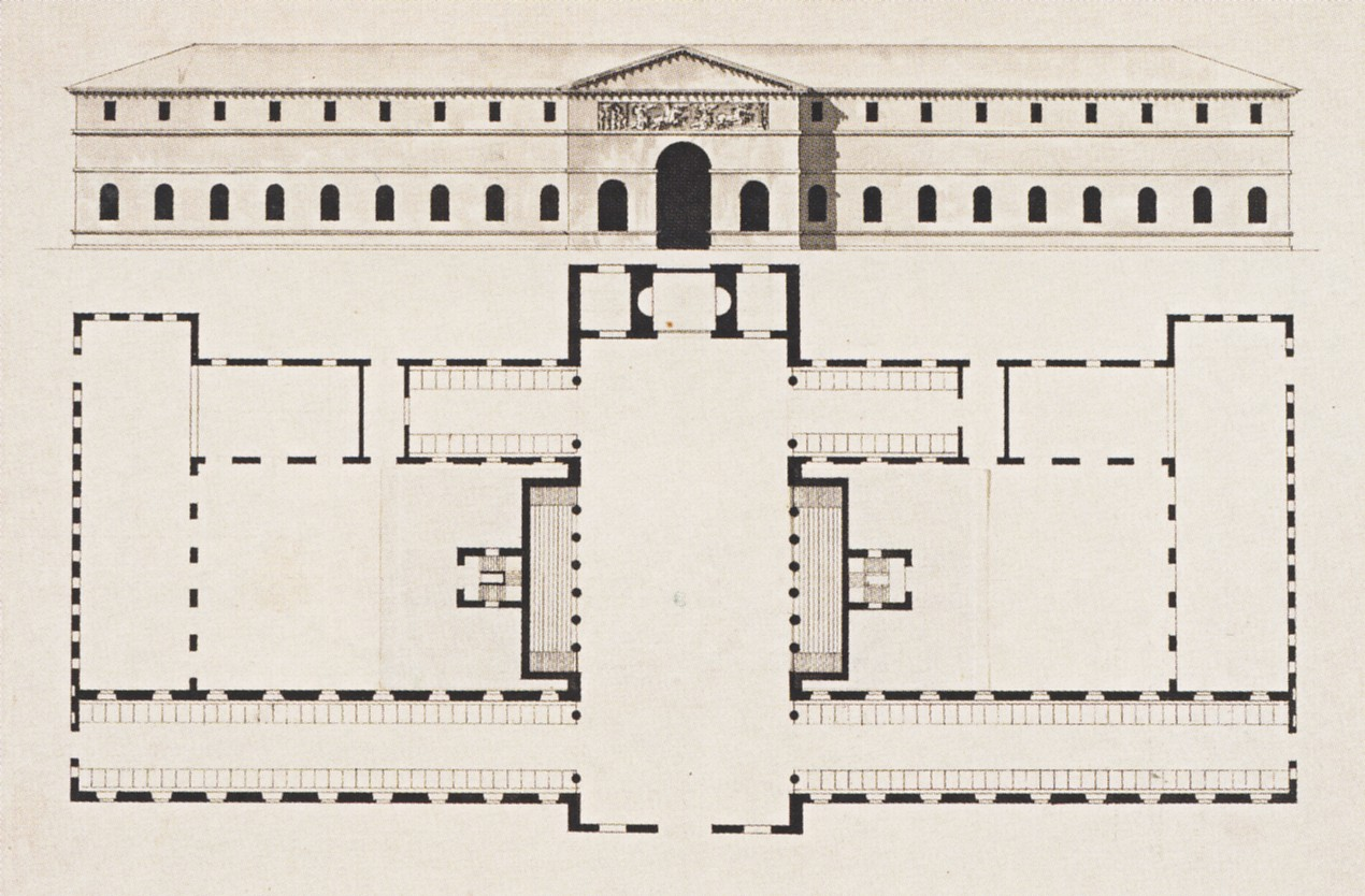 Fasad- och planritning till "Stora stallet" i Hagaparken